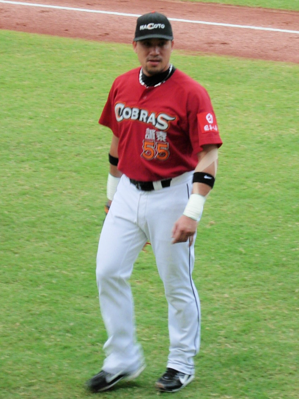 謝佳賢（台灣職業棒球選手／誠泰COBRAS隊）